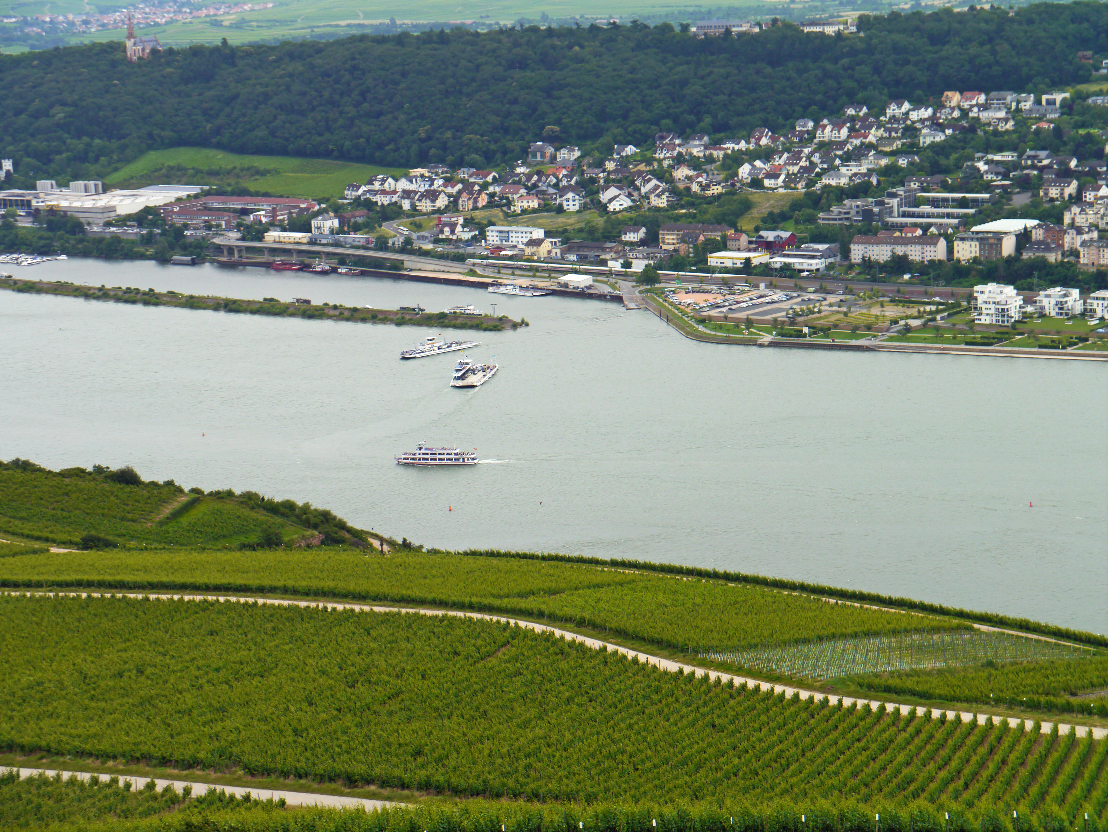 Der Rhein, Bingen und die Faehren nach Ruedesheim (2012) vom Niederwal-Denkmal aus.